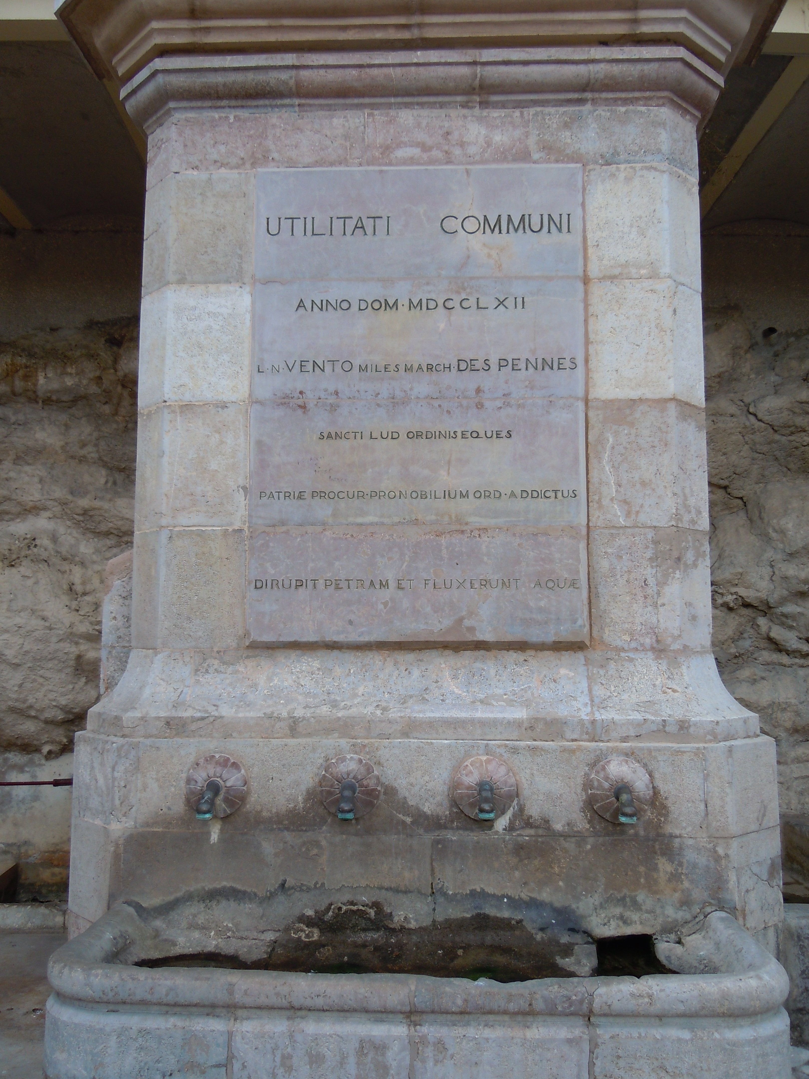 Fontaine des Quatre Canons (ou Fontaine de Vento), fondée en 1762 par Louis Nicolas II de Vento, sur la place du Quatre Septembre à l'entrée du vieux village des Pennes-Mirabeau